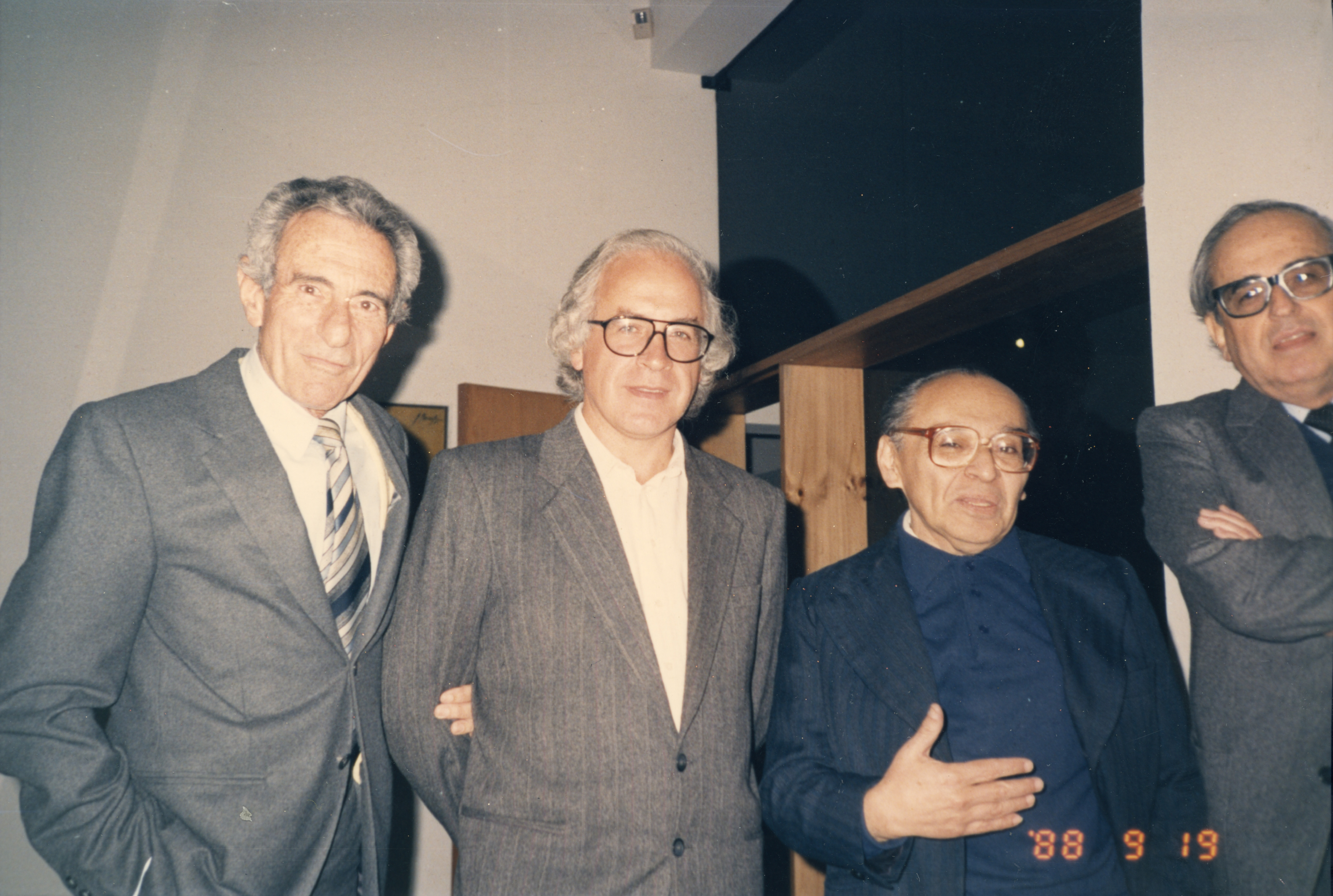 Leopoldo Chiappo, Antonio Melis, Padre Gustavo Gutiérrez y Javier Mariátegui Chiappe Puede usarse libremente bajo licencia CC mencionando en los créditos "Archivo José Carlos Maríategui, Lima, Peru "